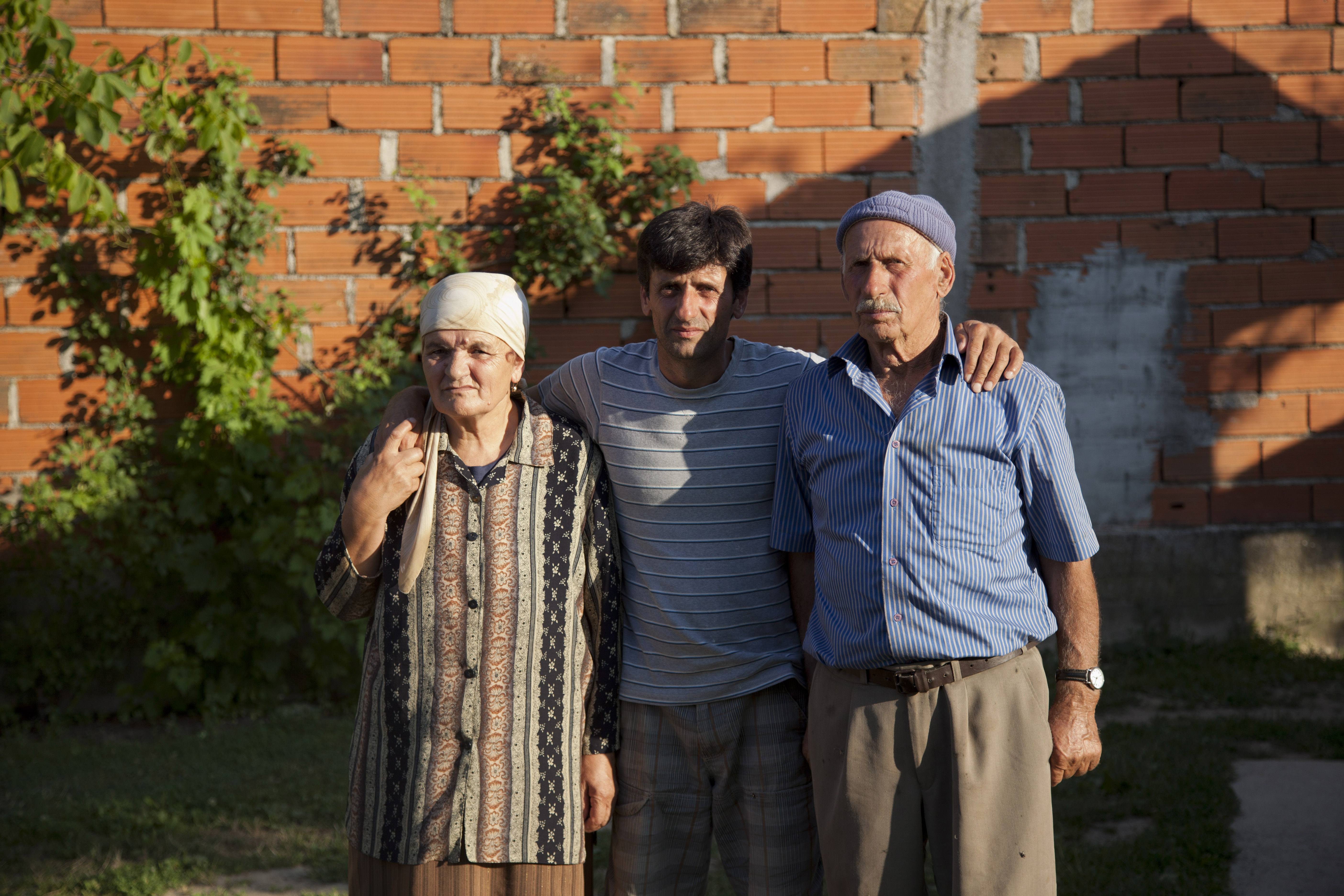 Ragip avec ses parents au Kosovo. Image tirée du film « Le monde est comme ça » de Fernand Melgar.